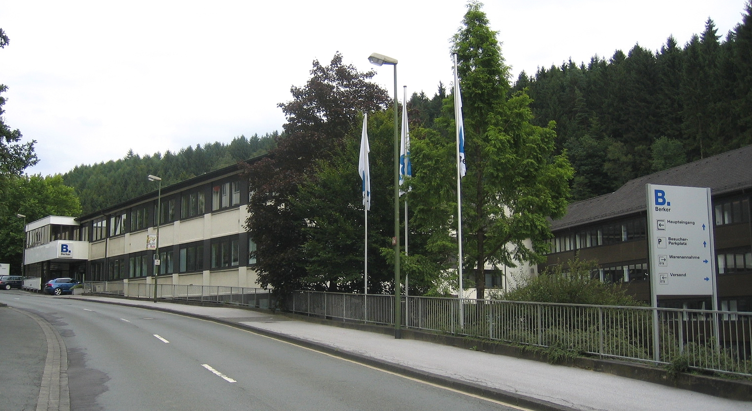 Berker GmbH & Co. KG, Klagebach 38 in Schalksmühle.